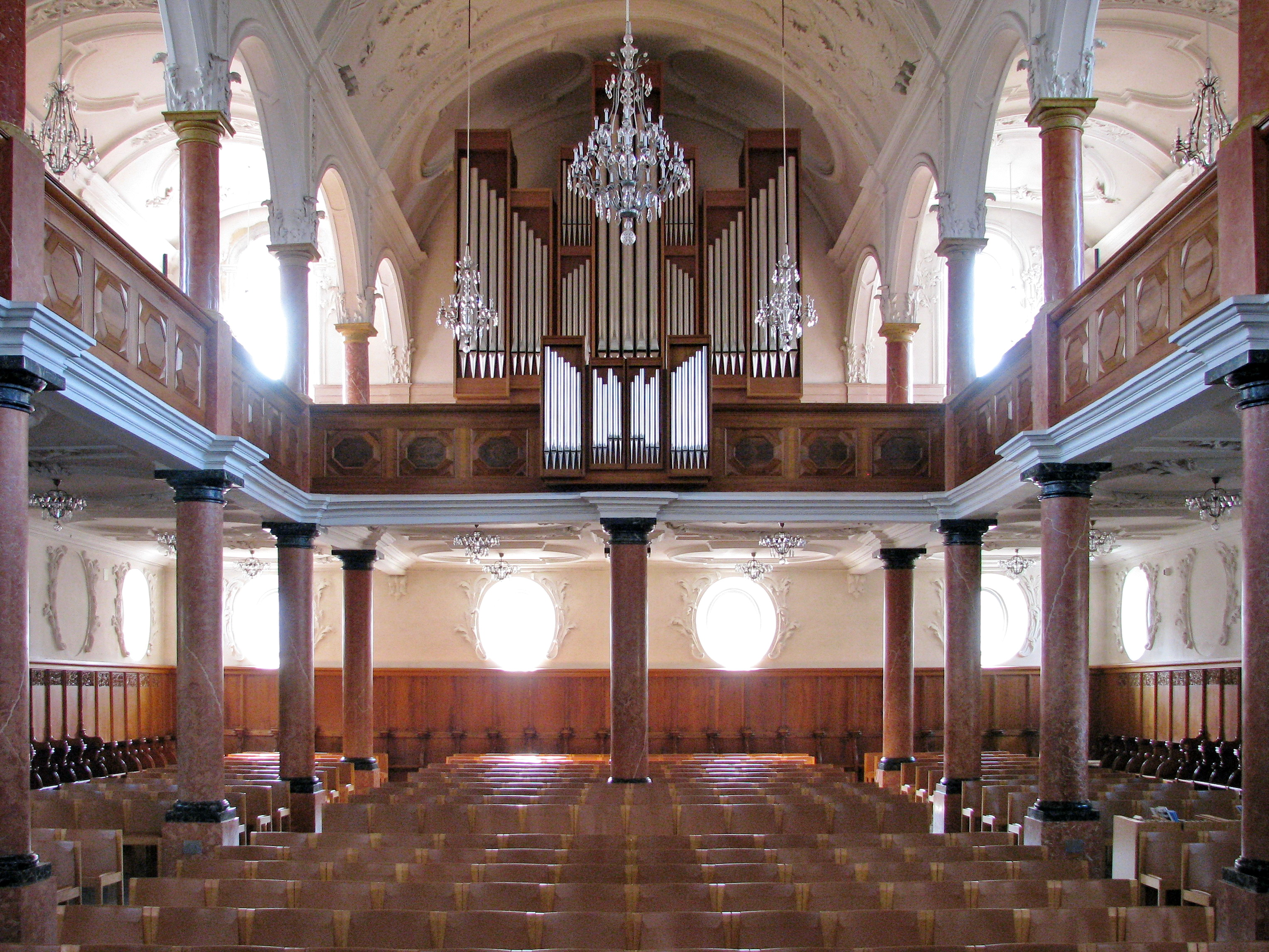 St. Peter Church in Zürich (Switzerland) as seen from St. Peterhofstatt